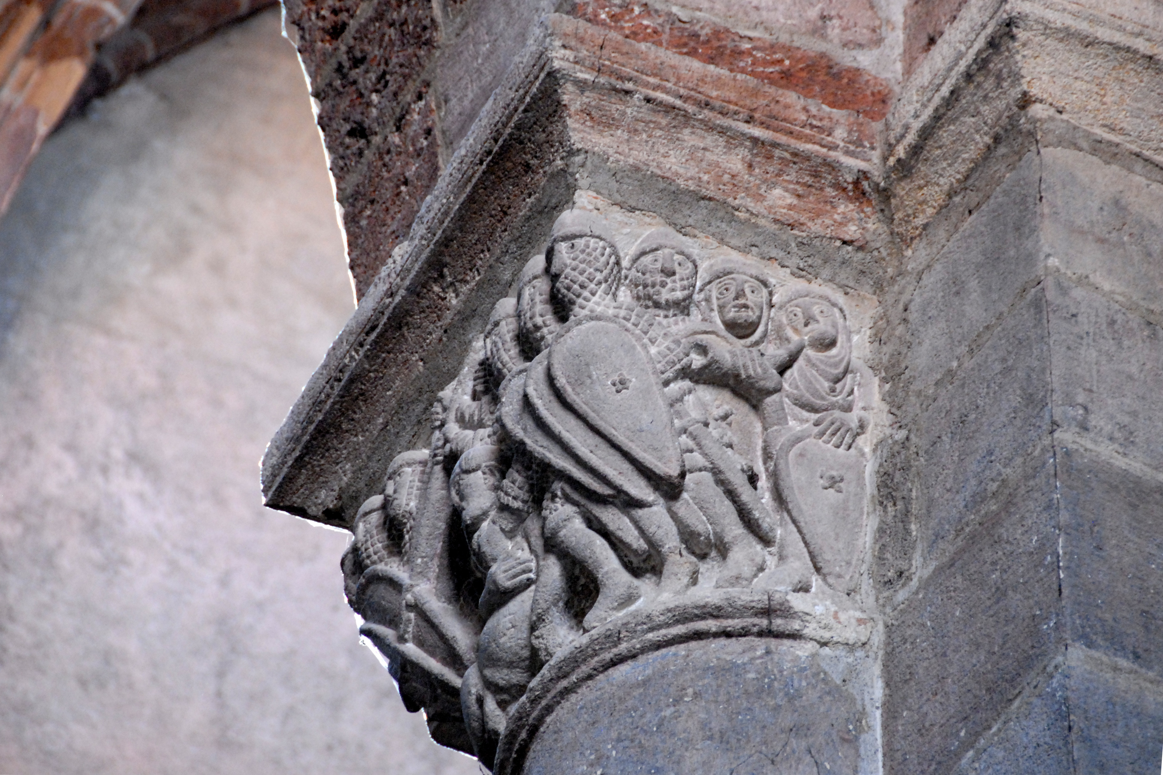 St.-Julien Brioude, Kapitell, Soldaten ergreifen nackten Mann (rechts)